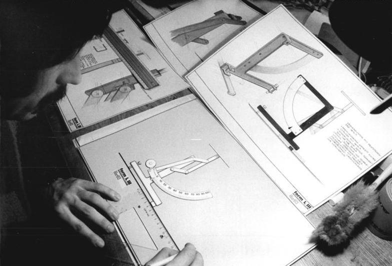 Konstrukteur Briefwaage zeichnend ADN-ZB Grubitzsch 20.12.85 Leipzig: "form L III" nennt sich das Kollegium von Formgestaltern in Leipzig, das seit einem Jahr besteht. Zu den Arbeiten, die im Atelier von Klaus Ebermann, Wolfgang Grosse und Andis Partzsch entstanden sind, gehört das Modell einer neuen Reihe von Briefwaagen. Die neu durchdachte Konstruktion soll nicht nur die seit über zwei Jahrzenten herkömmlichen Instrumente ablösen, der Herstellerbetrieb spart auch erheblich an Material und Arbeitszeit ein. (siehe 12 N)